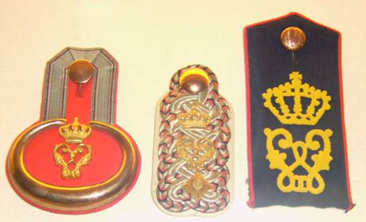 Dienstgradabzeichen des Infanterie-Regiments König Wilhelm I. (6. württembergisches) Nr. 124. Von links: Major, Oberstleutnant, Unteroffiziere und Mannschaften